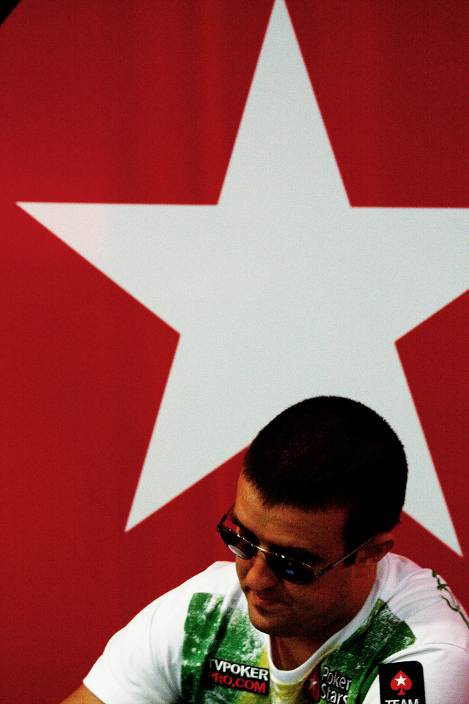 André Akkari